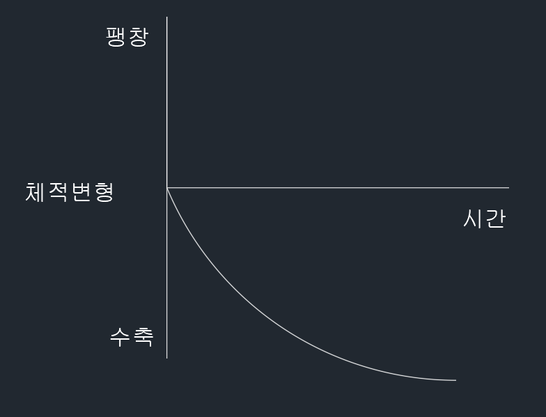 압밀배수시험 구속압력 단계